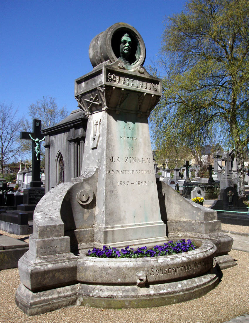 Graf vum Jean-Antoine Zinnen um Nikloskierfecht an der Stad. Den Zinnen war de Komponist vun der Melodie vun der Lëtzebuerger Nationalhymn Ons Heemecht.